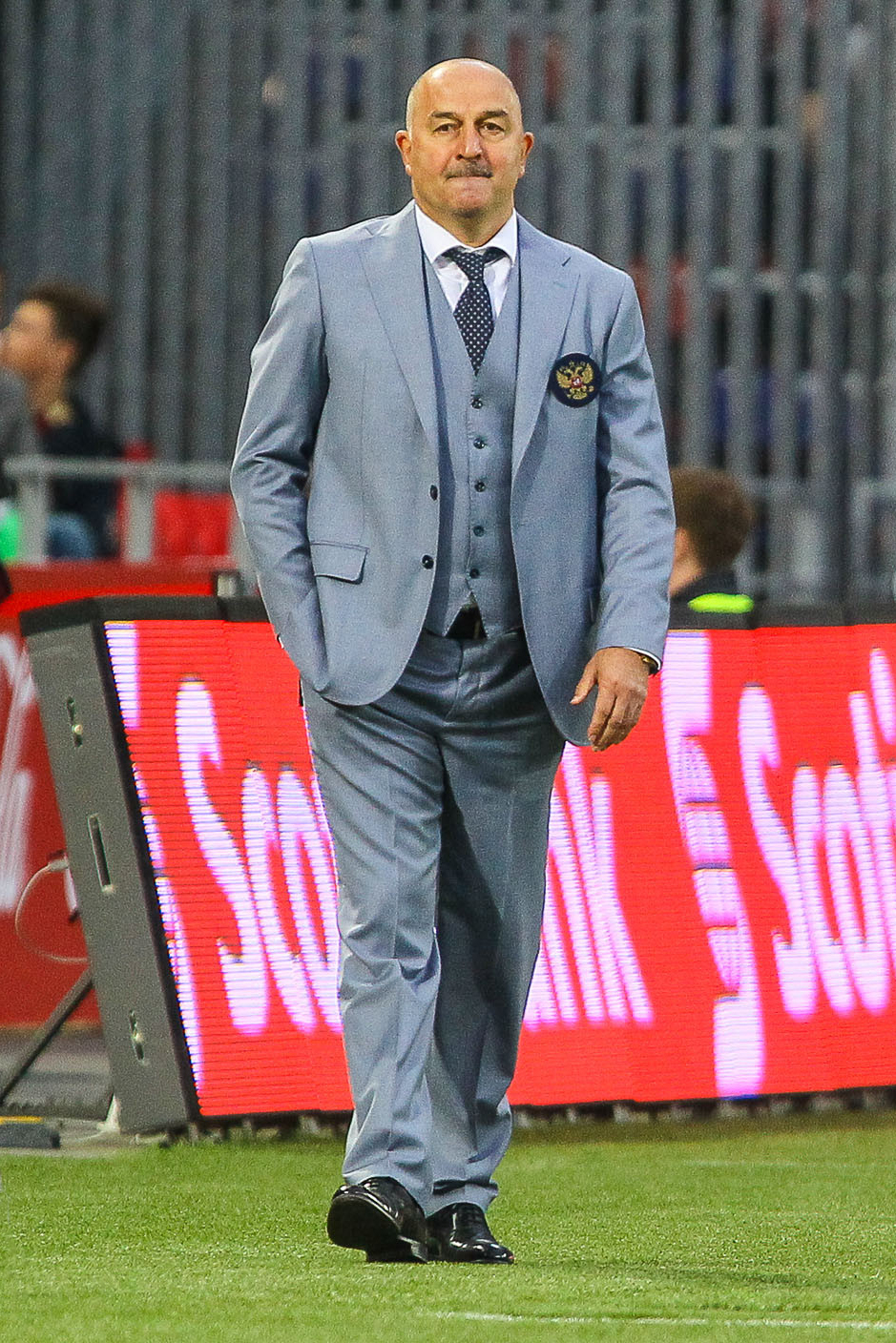 Россия - Чили